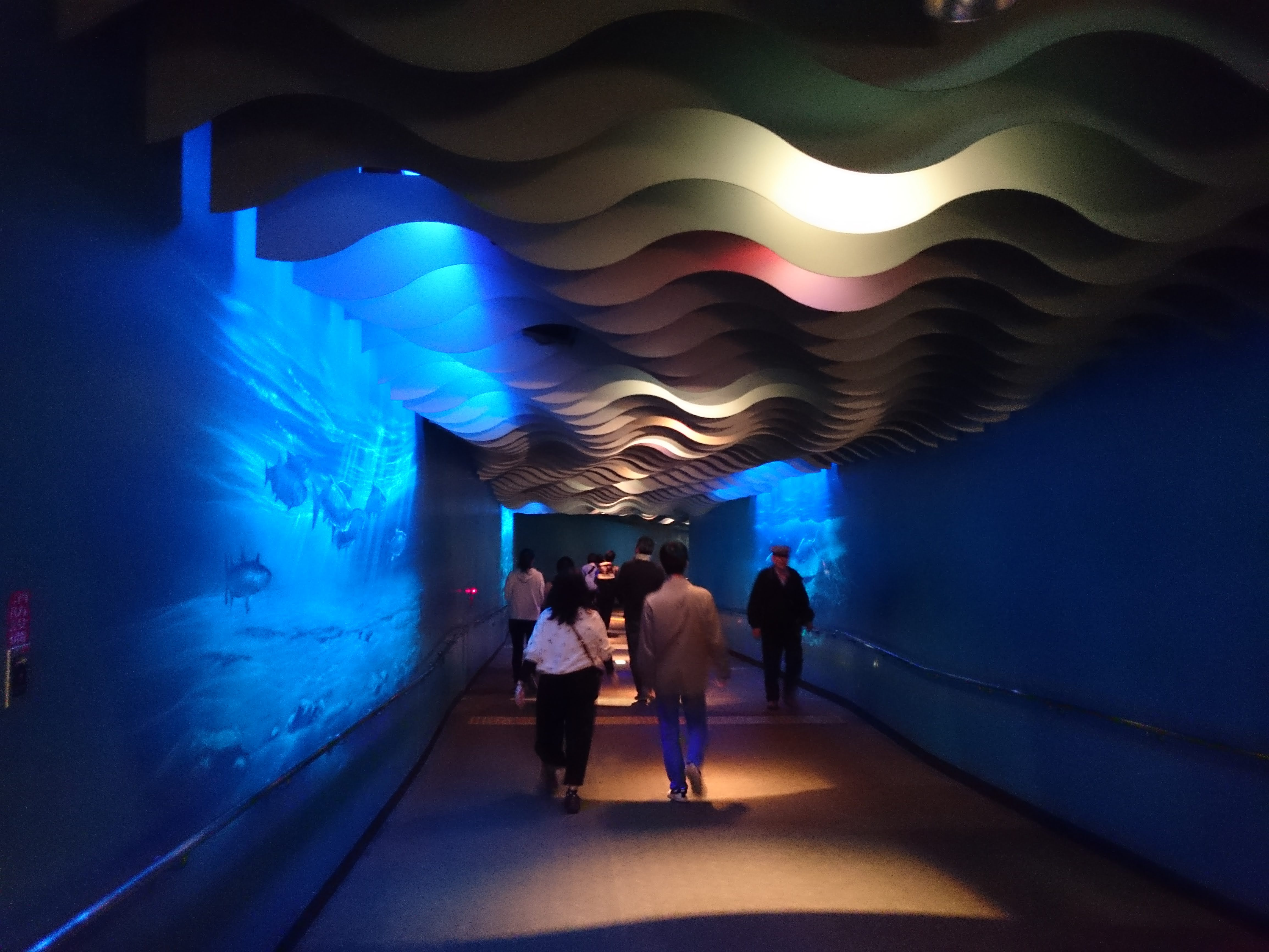 イヨボヤ会館の館内地下通路